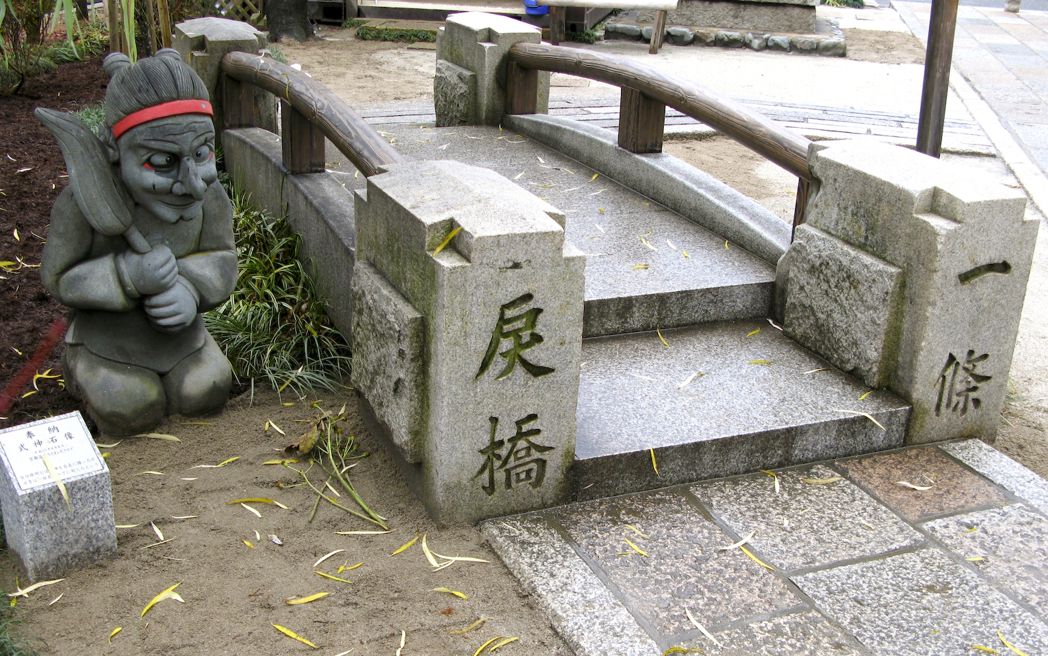 Seimei Shrine 晴明神社 devoted to Abe no Seimei. Kyoto, Japan. Ichijo Modori-bashi